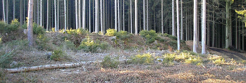 Frühmittelalterliche Abschnittsbefestigung "Pfarrerschanze" bei Todtenweis (Landkreis Aichach-Friedberg, Bayerisch-Schwaben). Der Nordteil der Vorburg von Osten. Eigene Aufnahme, Feb. 2008 / Early Middle Ages hill fort "Pfarrerschanze" near Todtenweis (Landkreis Aichach-Friedberg, Bavaria, Germany). The northern part of the bailey from the east. Own photo, Feb. 2008